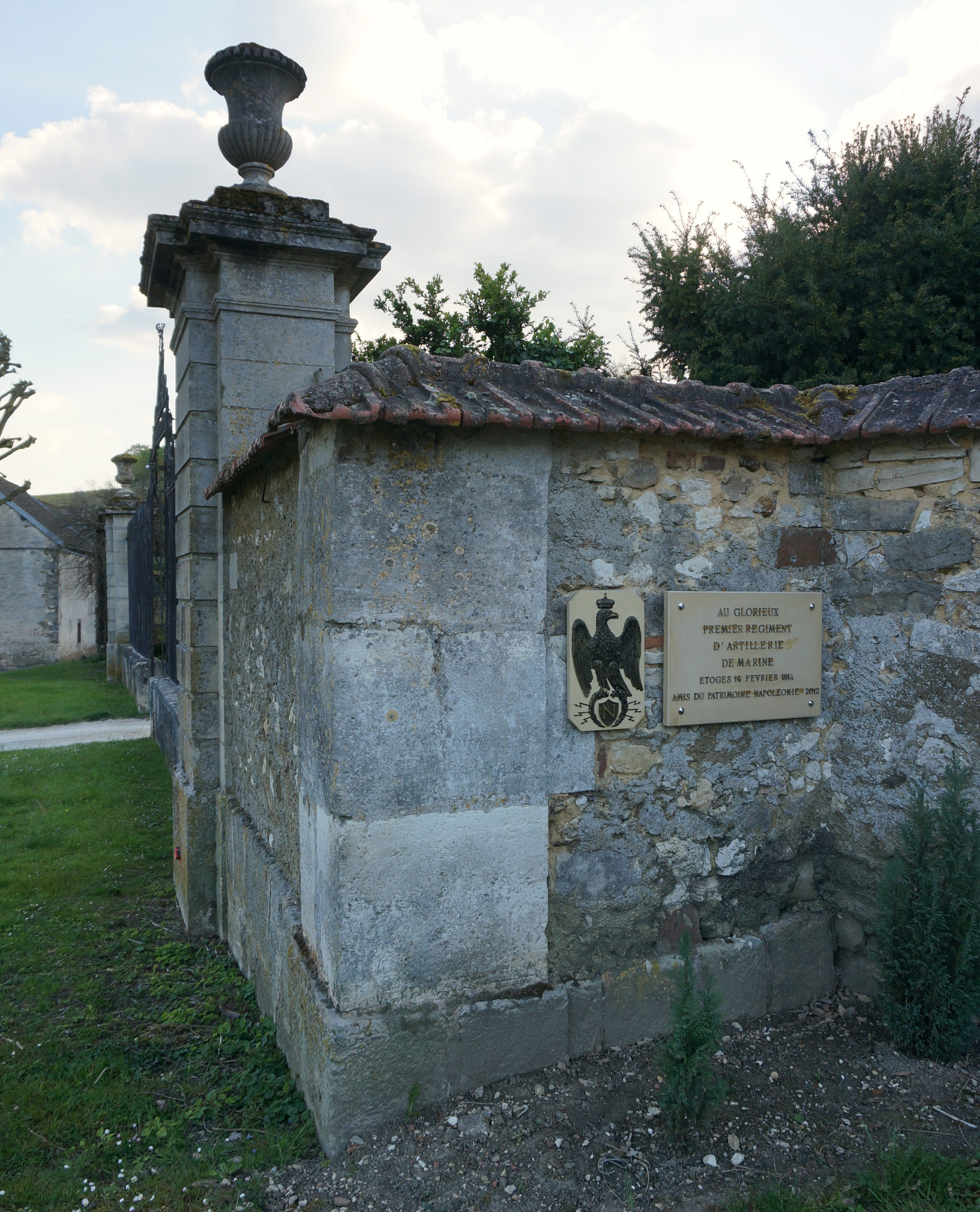 monument au 1er régiment d'artillerie de marine pour sont action du 10 février 1814.